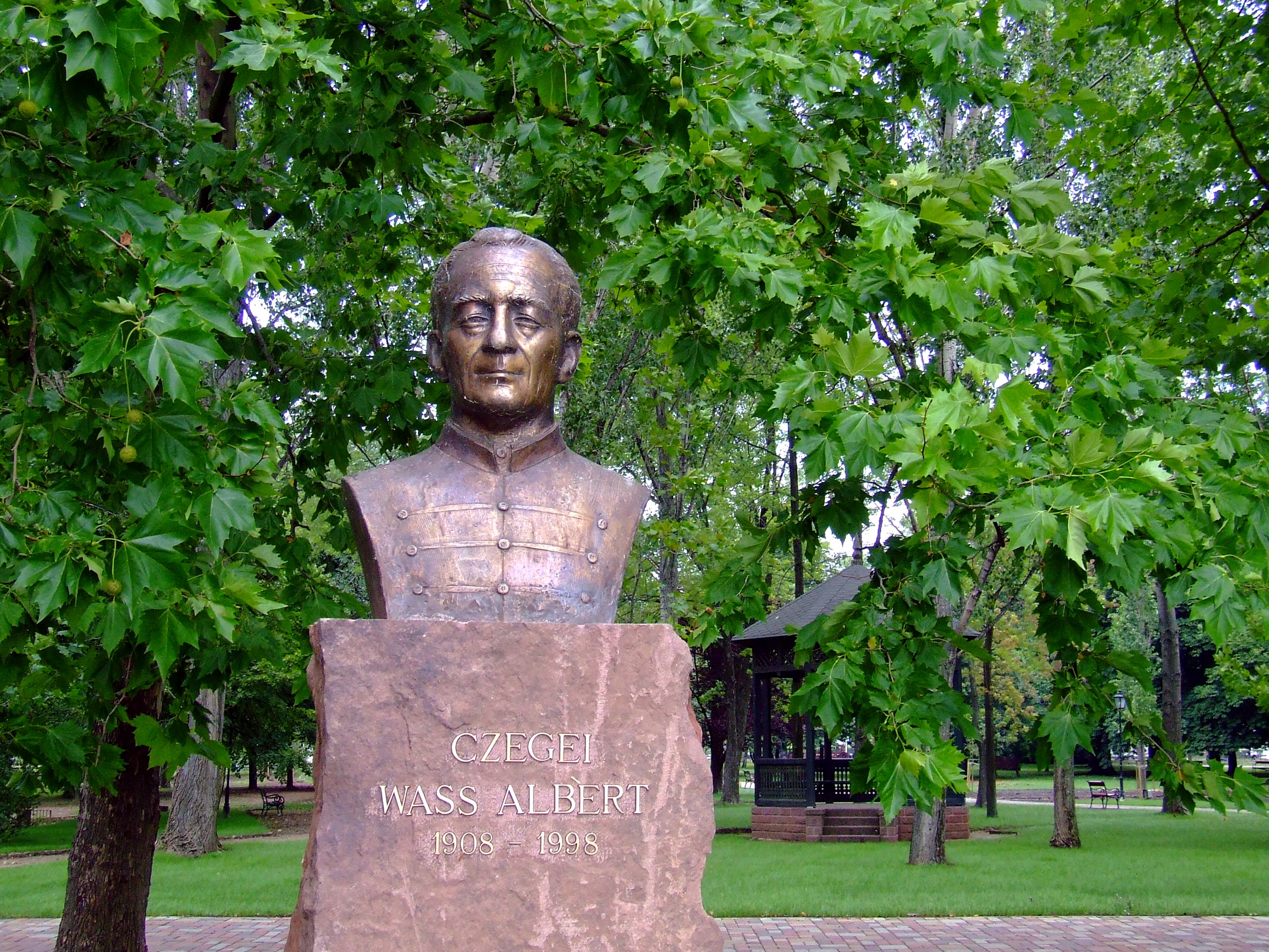 Wass Albert mellszobra Balatonalmádin. Mihály Gábor szobrászművész alkotása (2008)